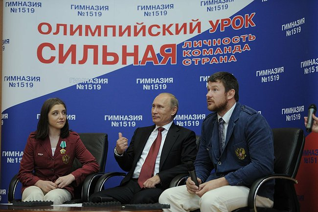 Посещение московской гимназии №1519. Олимпийский урок ведут чемпионка Олимпийских игр в Лондоне по спортивной гимнастике Алия Мустафина (слева) и серебряный призёр Игр дзюдоист Александр Михайлин.